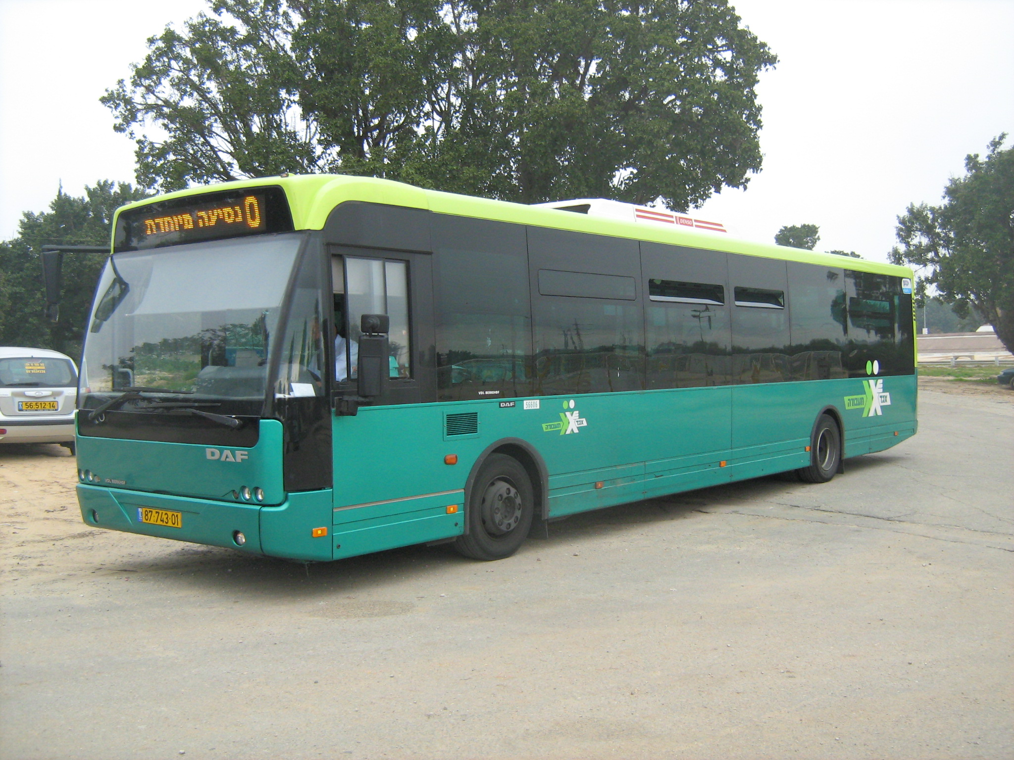 אוטובוס תוצרת דאף של אגד תעבורה